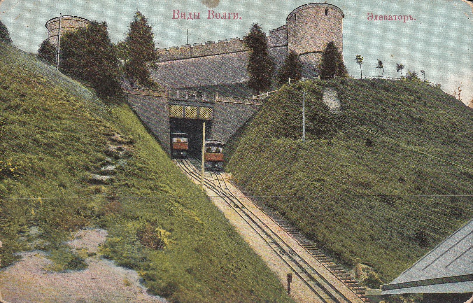 Кремлёвский элеватор (фуникулёр) в Нижнем Новгороде